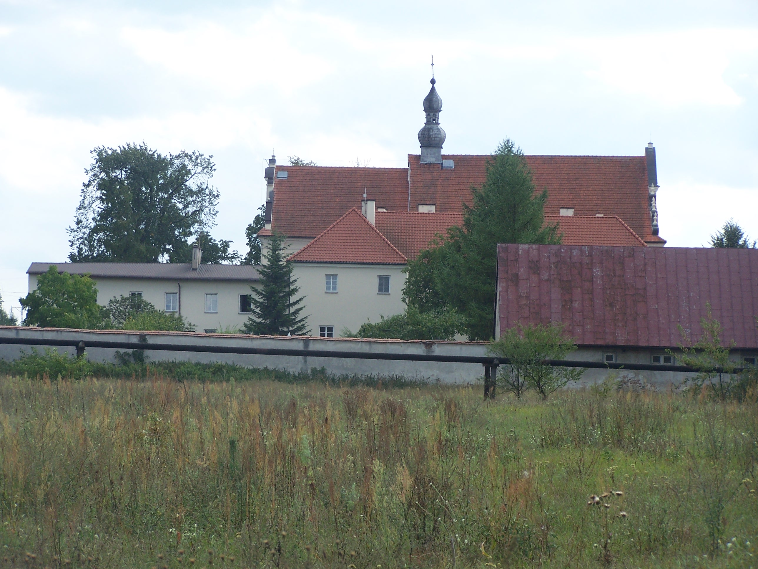 Smardzewice - zespół klasztorny franciszkanów: - klasztor, ob. plebania, 1 poł. XVIII w. - kaplica, XVIII/XIX w. - ogrodzenie klasztoru z dwiema basztami, XVIII w. - dzwonnica, 1722